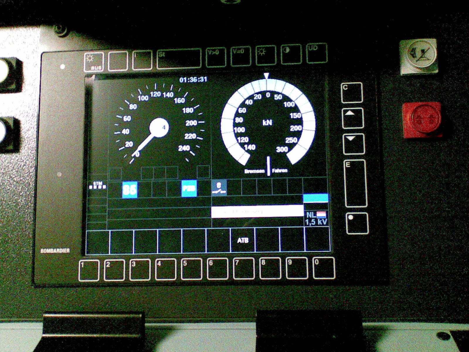 DMI STM PZB van Bombardier op BR186